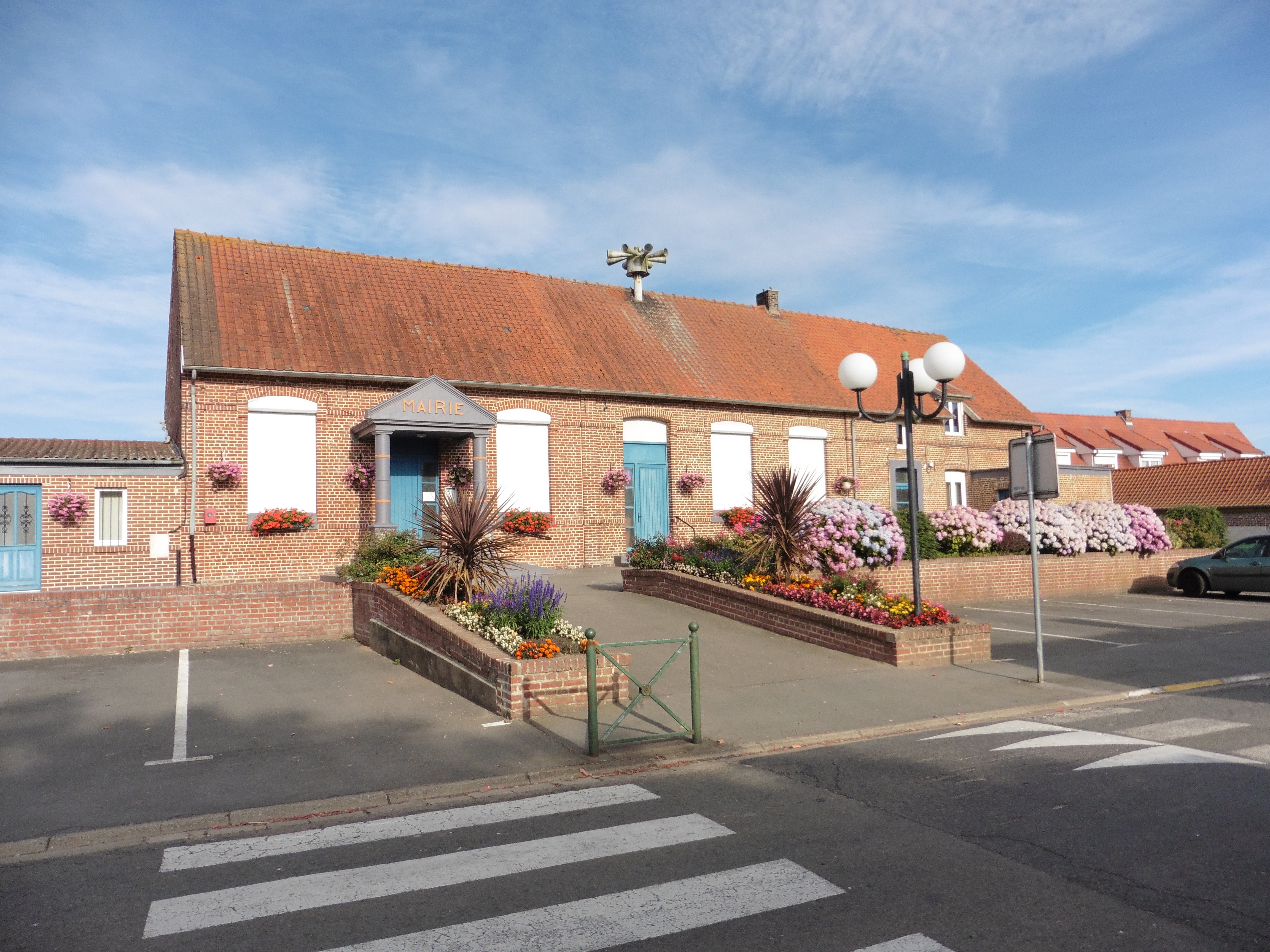 La mairie de Servins dans le Pas-de-Calais Nord-Pas-de-Calais.- France.